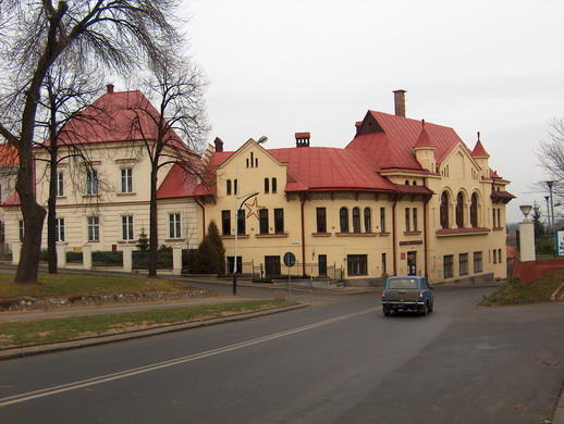 Leżajsk - ulica Jarosławska.